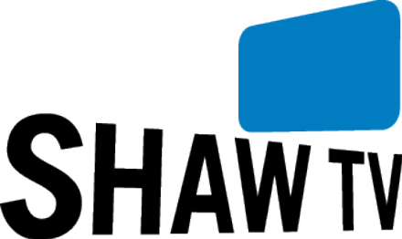 Shaw TV logo